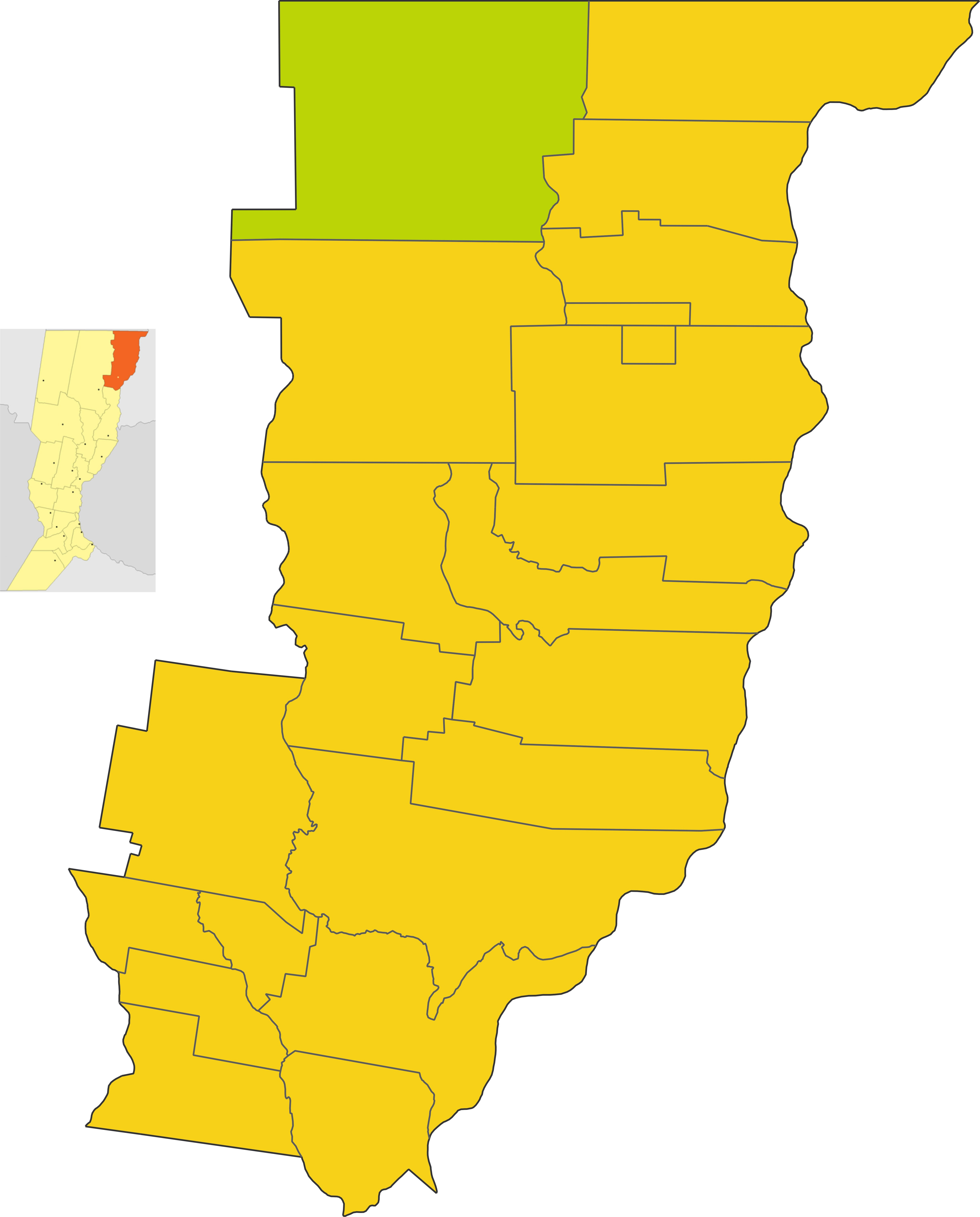 Map of the comuna de Villa Guillermina in General Obligado department, Santa Fe provinca, Argentina